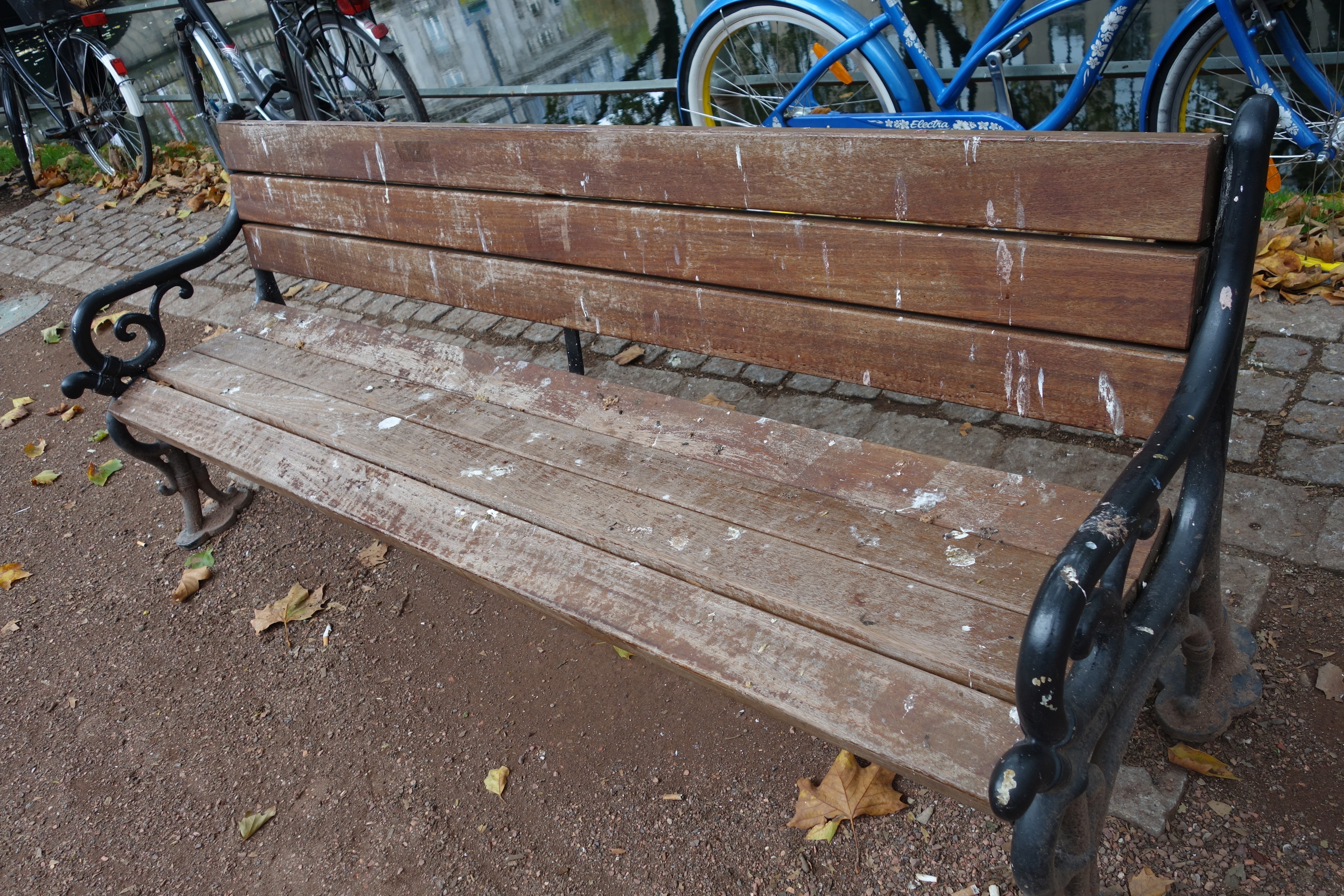 Düsseldorf, Königsallee, von Indischen Halsbandsittichen und Dohlen verschmutzte Sitzbank. 2012 wurde die Anzahl allein der Sittiche auf der Königsallee auf rund 1500 geschätzt. Das Gartenamt reinigt die Bänke, nach eigener Angabe, in der Regel alle zwei Wochen.